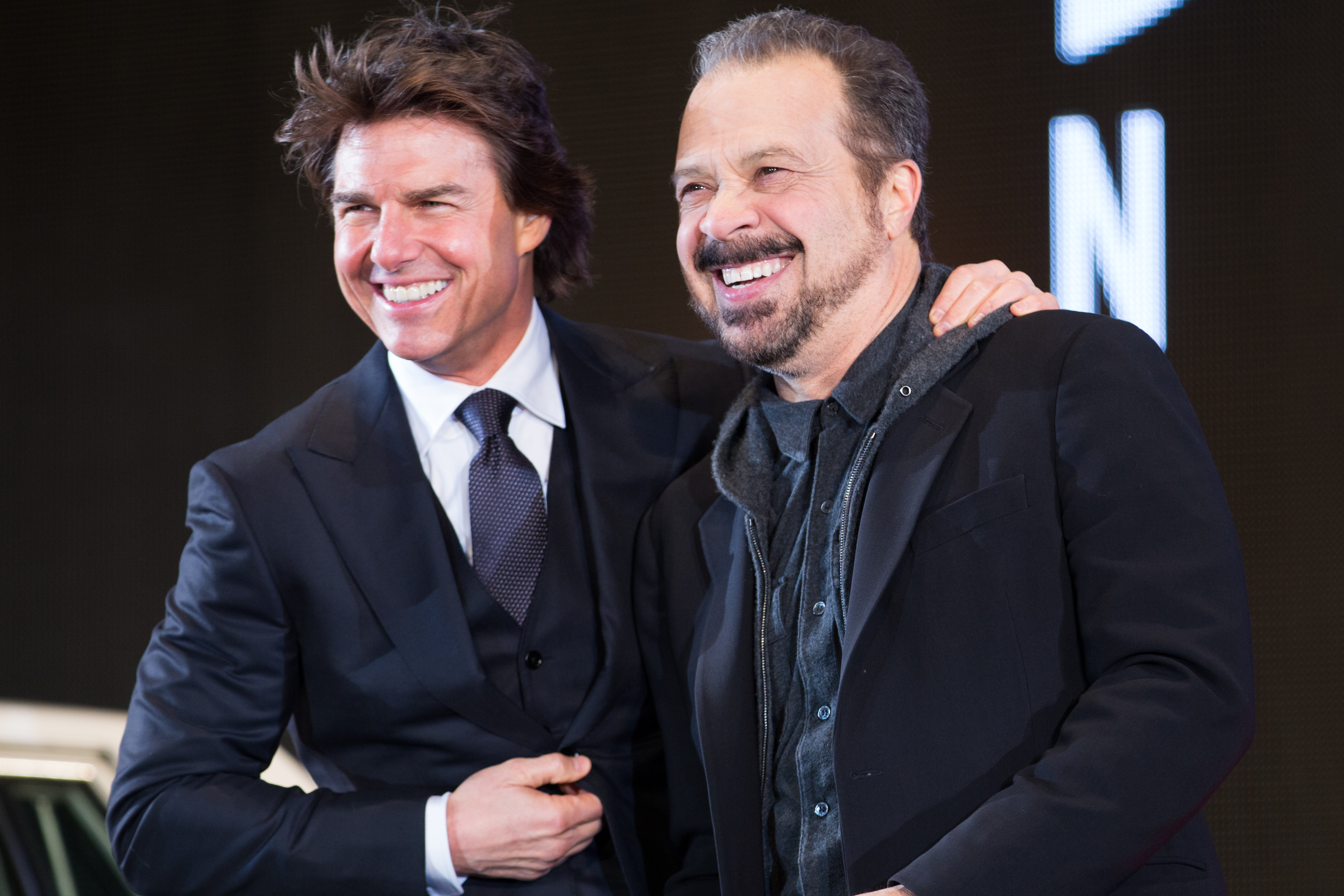 ジャック・リーチャー NEVER GO BACK ジャパン・プレミア レッドカーペット トム・クルーズ エドワード・ズウィック